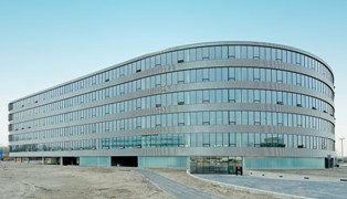 TransPort TransPort heeft een verhuurbaar vloeroppervlak van 10.800 m² en is verhuurd aan de luchtvaartmaatschappijen en Martinair die er hun hoofdkantoor vestigen. De bouw is gestart op 17 maart 2009. Het duurzame concept en het architectonisch ontwerp zijn in samenwerking met Architectenbureau Paul de Ruiter uit Amsterdam tot stand gekomen. De bouw is gerealiseerd door Bouwbedrijf De Vries en Verburg uit Stolwijk.